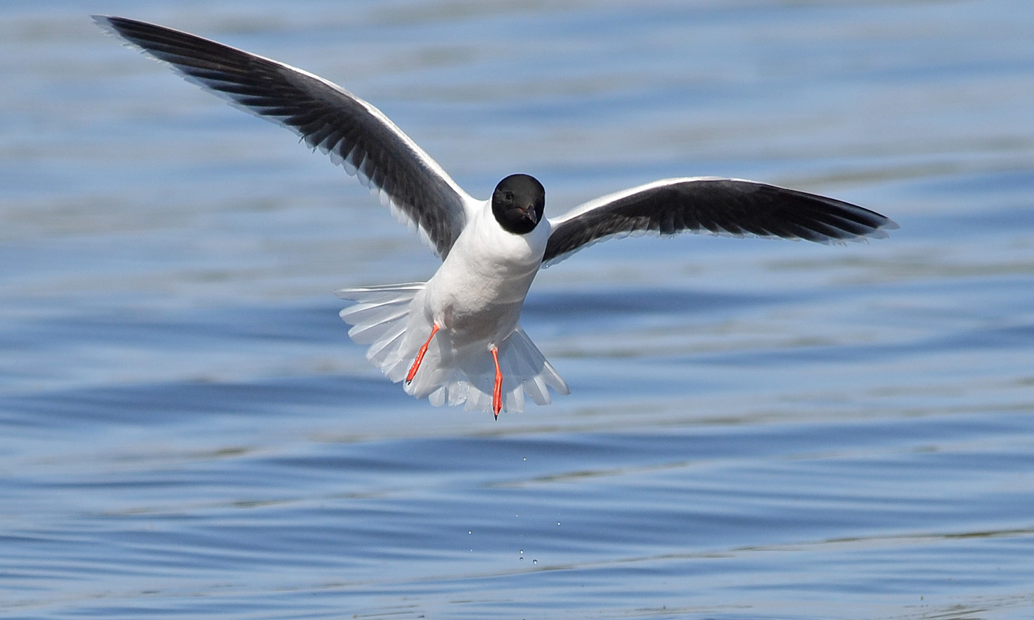 Little Gull Hydrocoloeus minutus, adult summer, Saint Petersburg, Russia